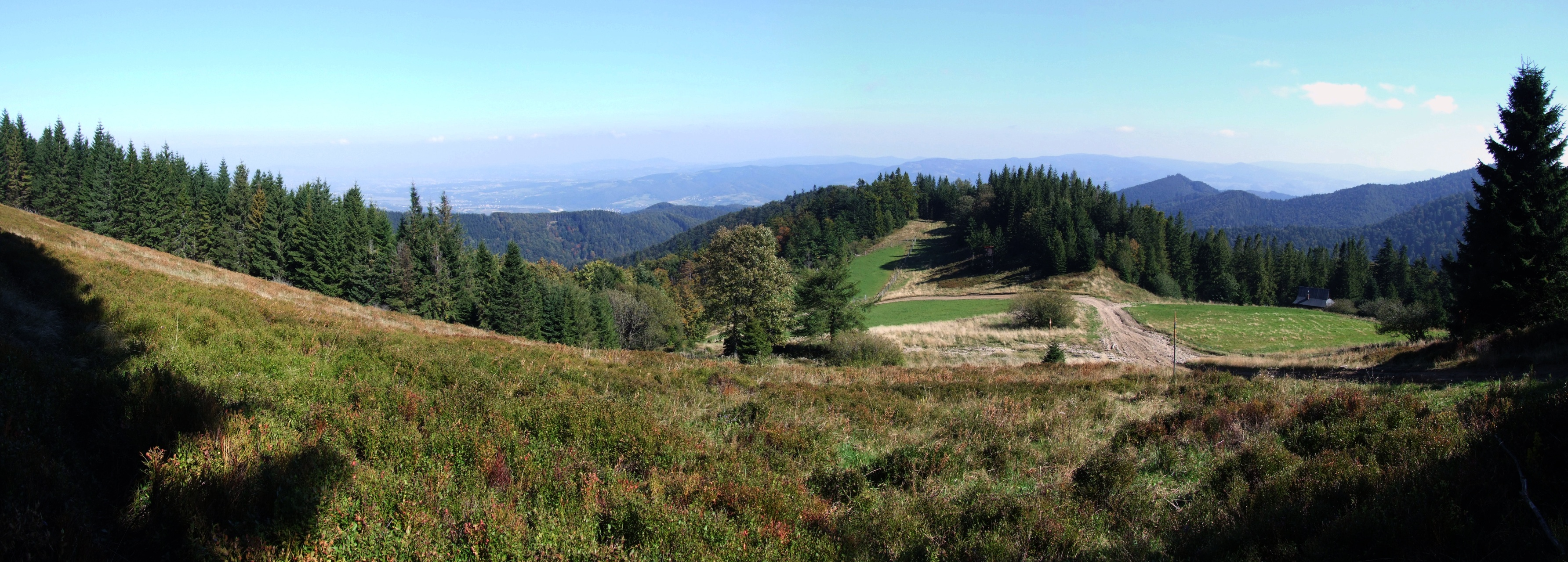 Hala Konieczna w Beskidzie Sądeckim